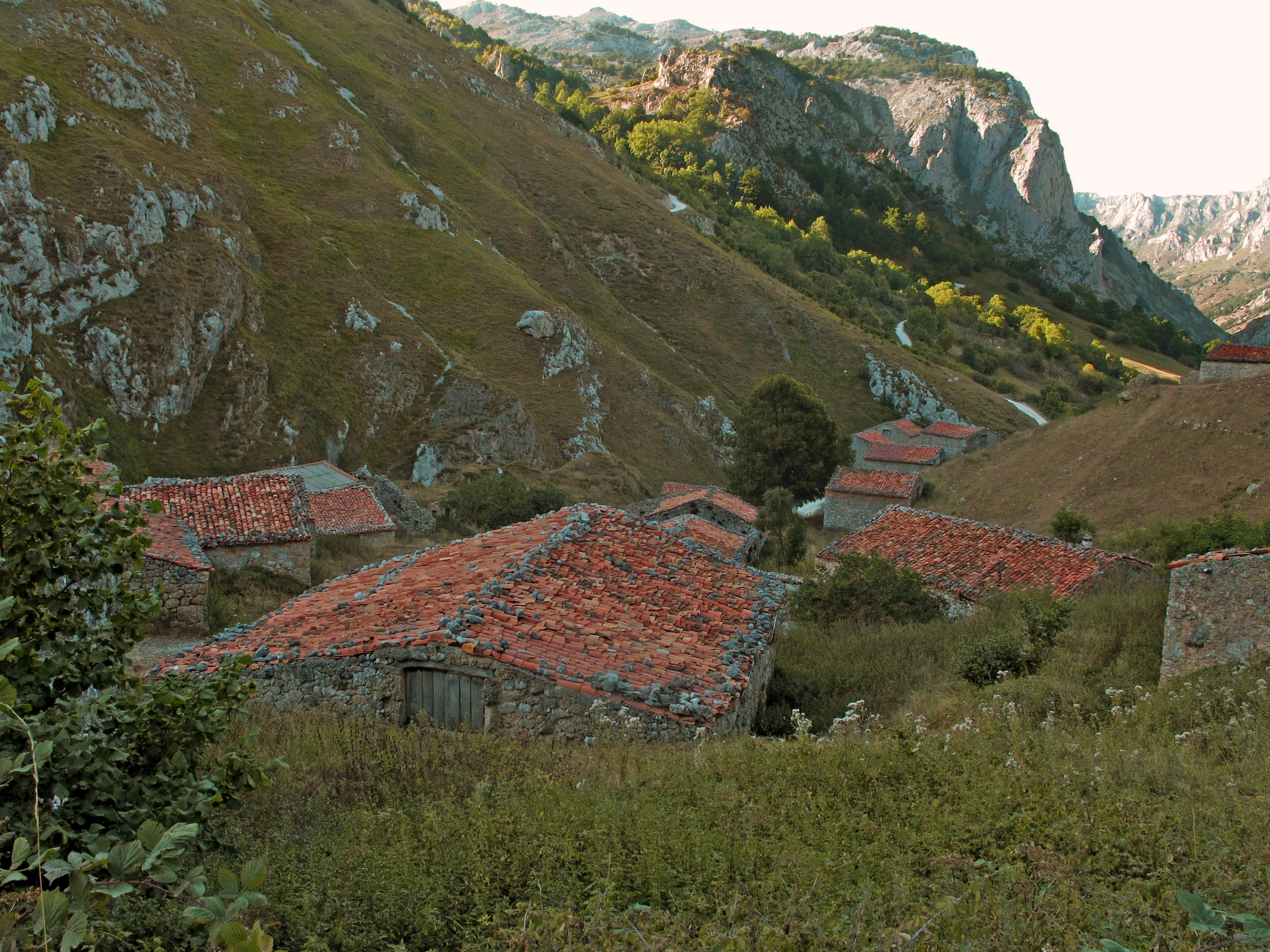 Conjunto de cabañas realizados por los pastores en las que los muros son sin argamasas y las techumbres de teja curva, aunque en el pasado sus tejados posiblemente eran de otros elementos vegetales. En los Invernales del Texu, a 900 m. de altura, se inicia la pista hacia Collado Pandébano.